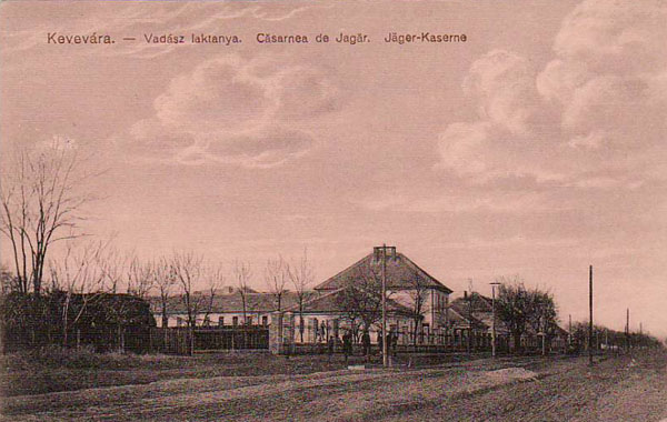 k.u.k. Jägerkaserne in Kevevára